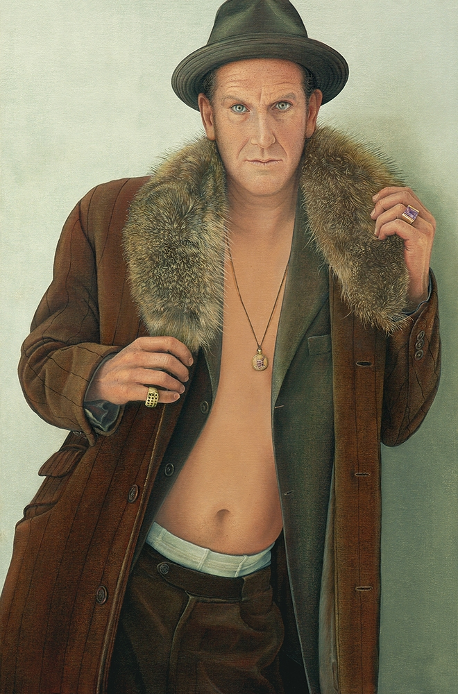 Portrait des Schauspielers Kai Maertens